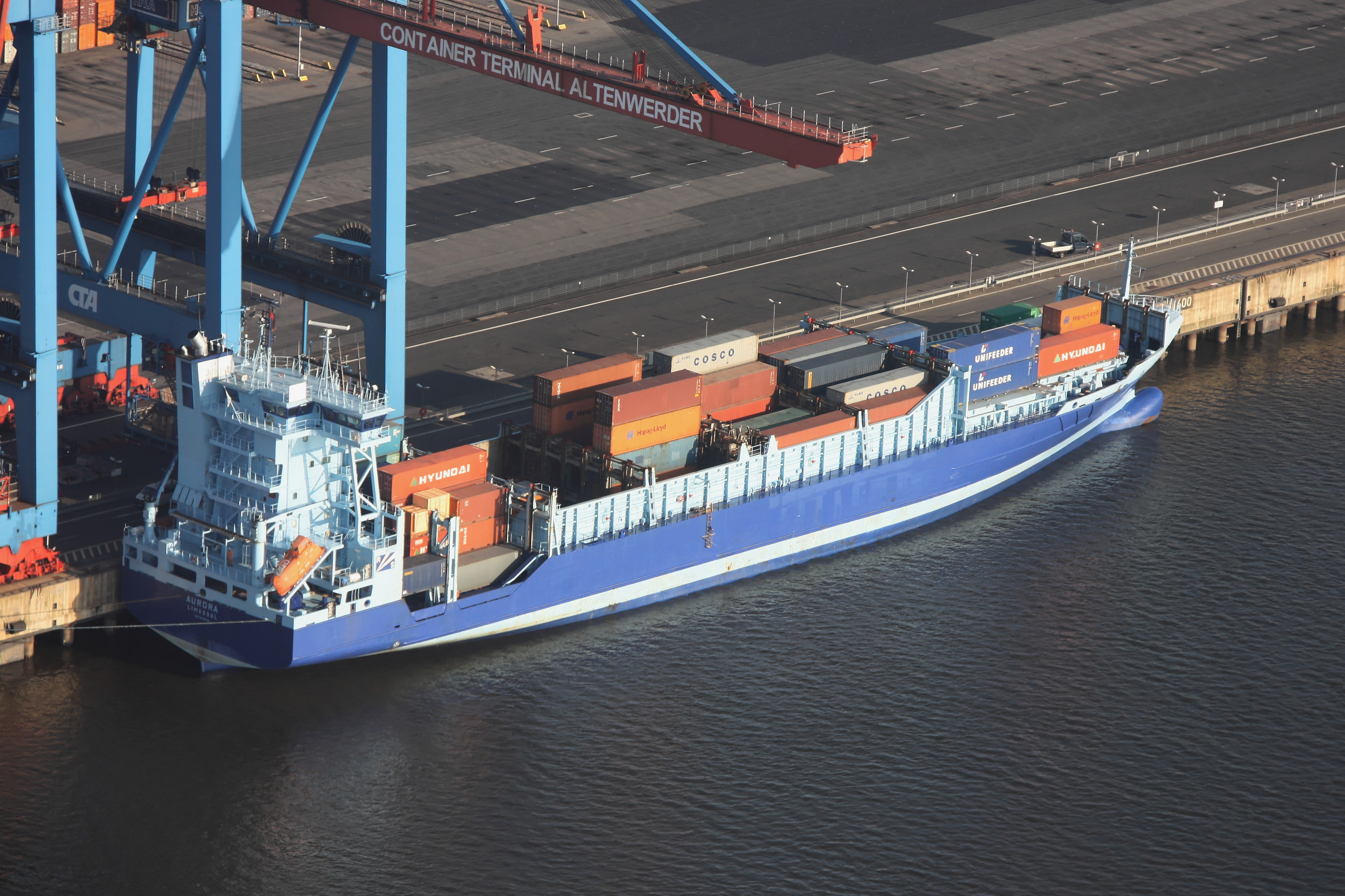 Hamburger Hafen, Open-Top-Container-Feederschiff Aurora (Sietas Typ 168) am CTA, Imo-Nummer: 9234989, Ablieferung: 4. August 2001, Reederei: Rudolf Schepers, Haren/Ems